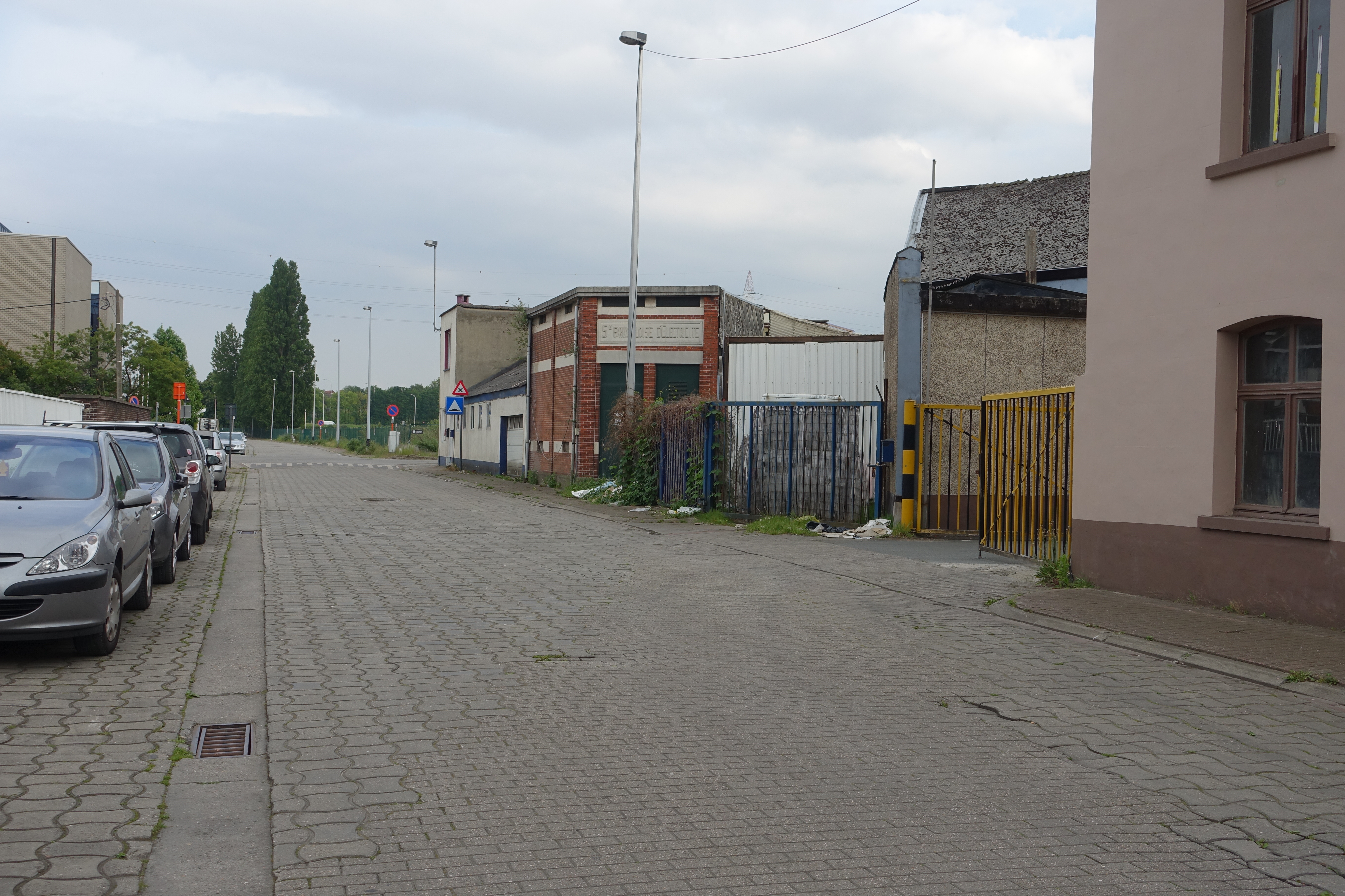 Spoorboog van de CFI-spoorweg in Machelen. De CFI snijdt het kruispunt Rittwegerlaan - Nieuwbruglaan af via een spoorbocht. Huidige bebouwing is nog steeds aangepast aan dit oude tracé. Links van het voormalige tracé staat een gebouw van de Societé Bruxelloise d'Electricité